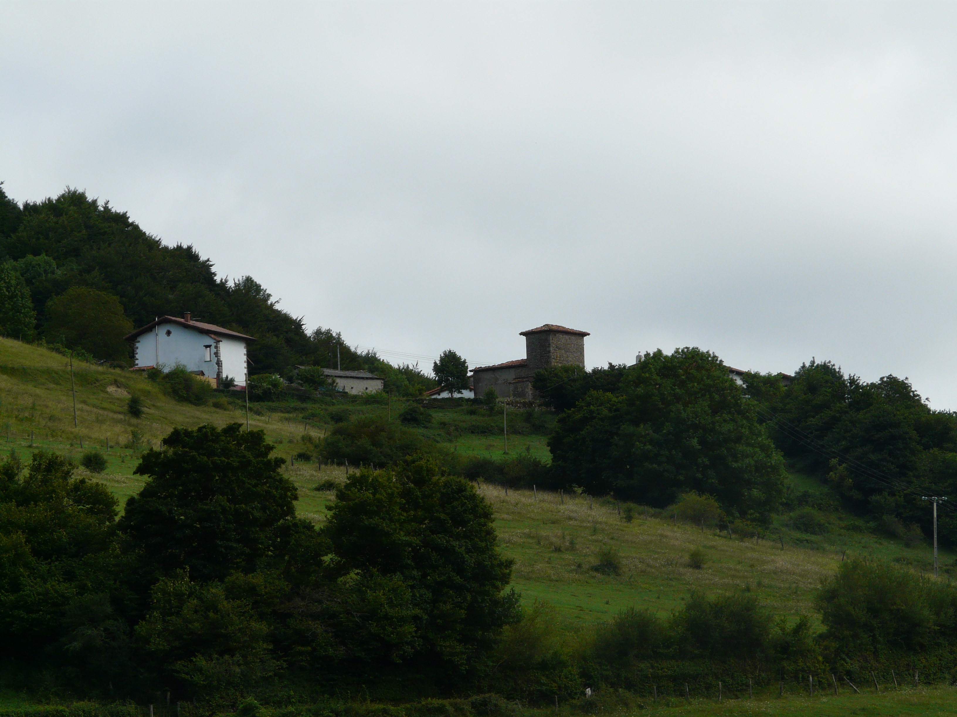 Zarrantz (Imotz)